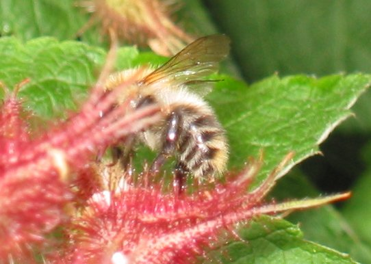 zelfgemaakte foto van de Heidehommel op Japanse wijnbes; eind juni